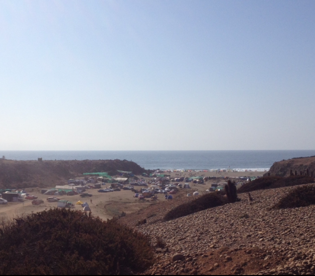 Camping Municipal Agua de la Zorra